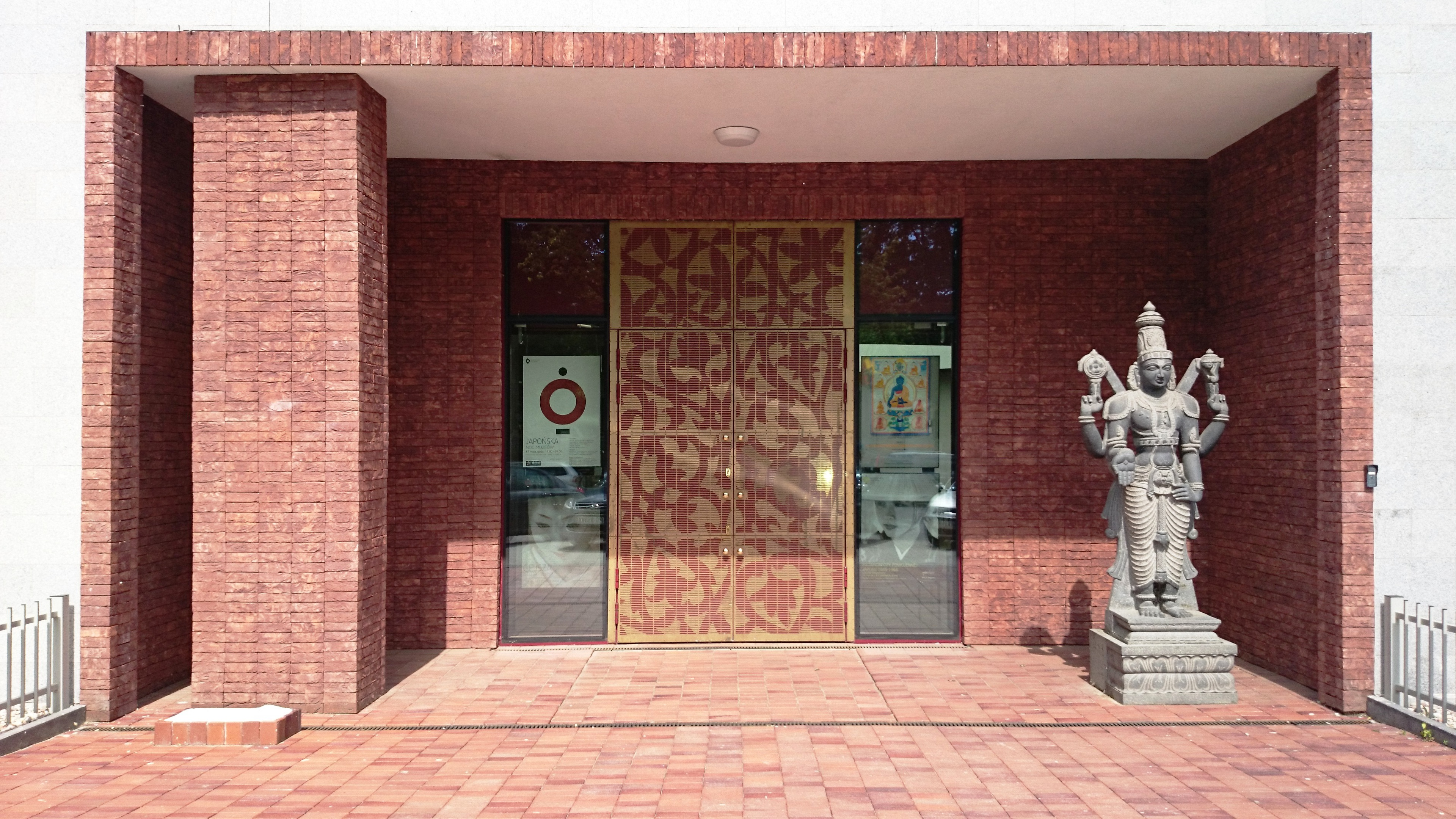 Wejście do Muzeum Azjii i Pacyfiku przy ul. Solec 24 w Warszawie